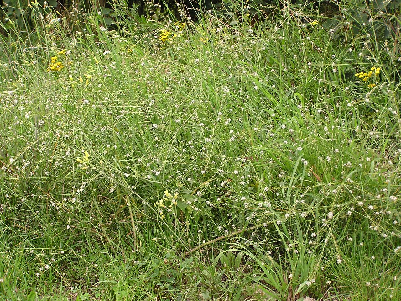 Lepidium graminifolium am Rheinufer in Bonn-Beuel